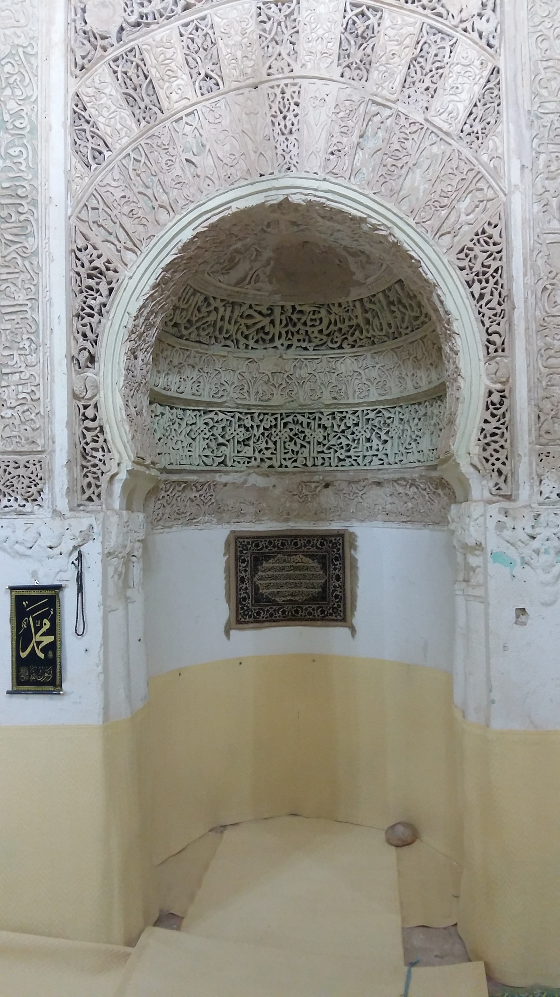 Mihrab de la mosquée de Beled-el-Adher, datant de 590 de l'Hégire